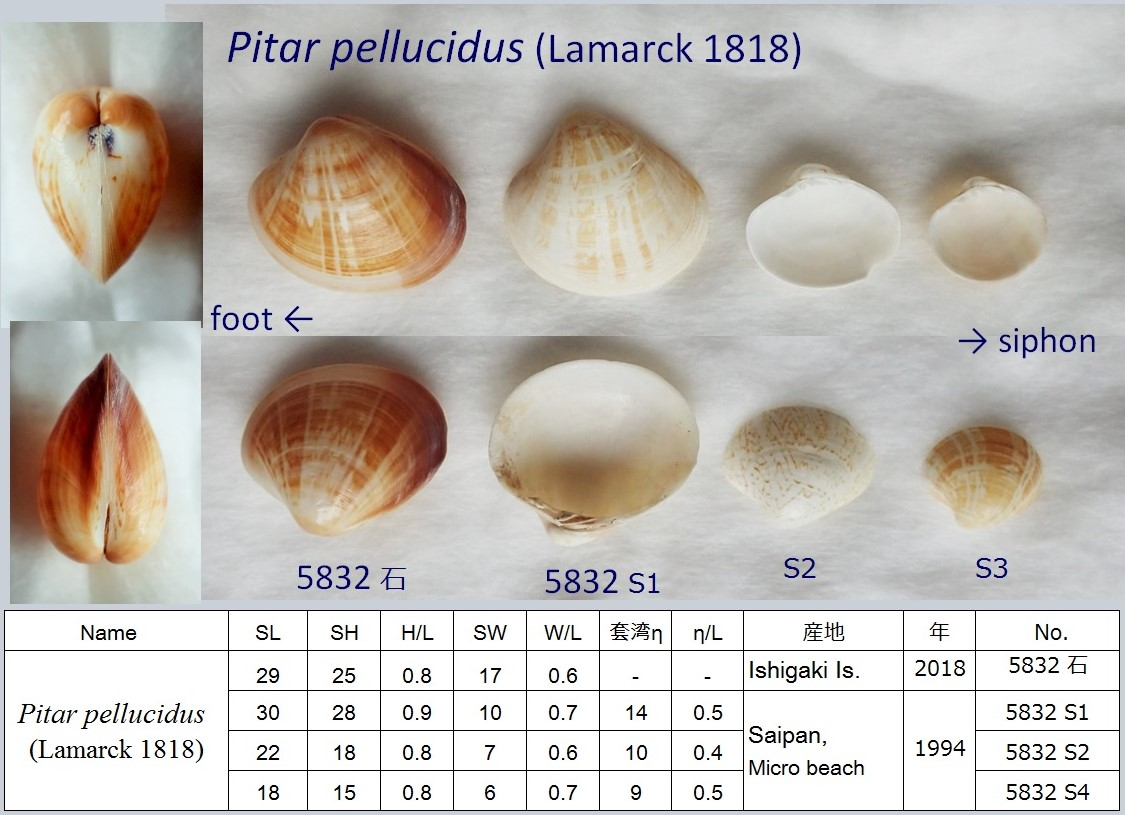 石垣島久宇良の両弁（生貝）と、サイパンの海岸で打ち上げを拾った3枚。